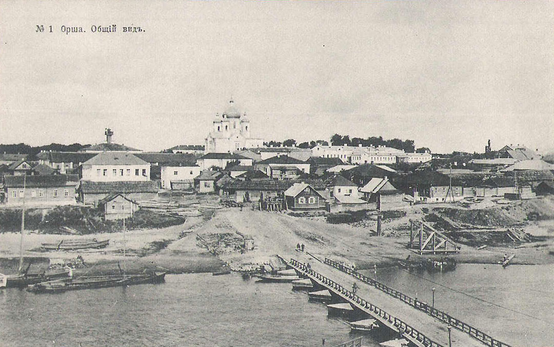 Беларуская (тарашкевіца): Ворша (Vorša), рака Дняпро (Dniapro)